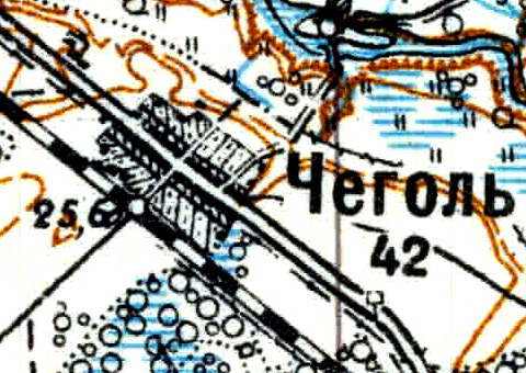 Топографическая карта Ленинградской области, квадрат Vc-29 (Батецкая), деревня Чеголи